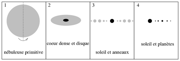 Scénario de formation du système solaire : nébuleuse primitive de Laplace. Auteur : Régis Lachaume. Original : thèse de doctorat ([1])